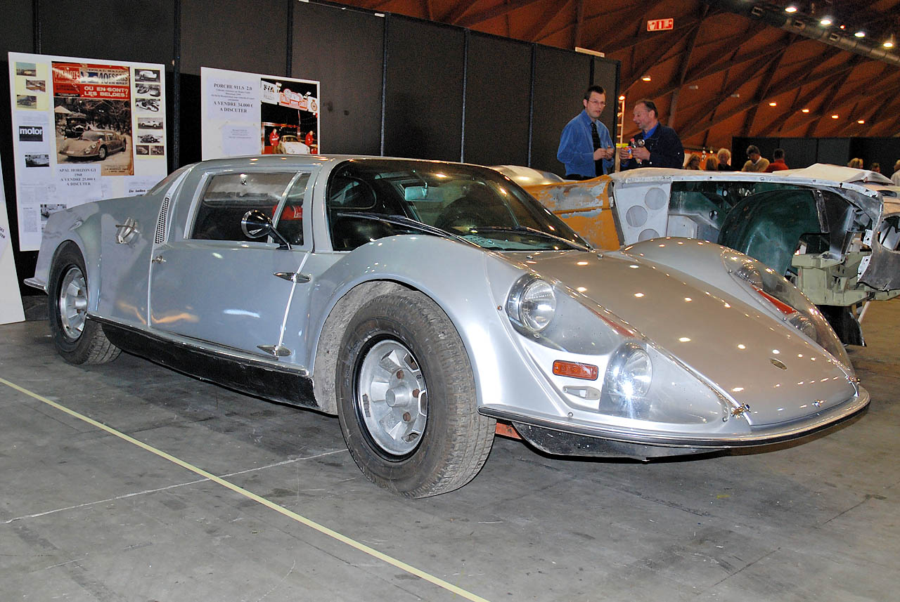 mid-engined sportscar, made in Belgium by Application Polyester Armé de Liége; left front-side view